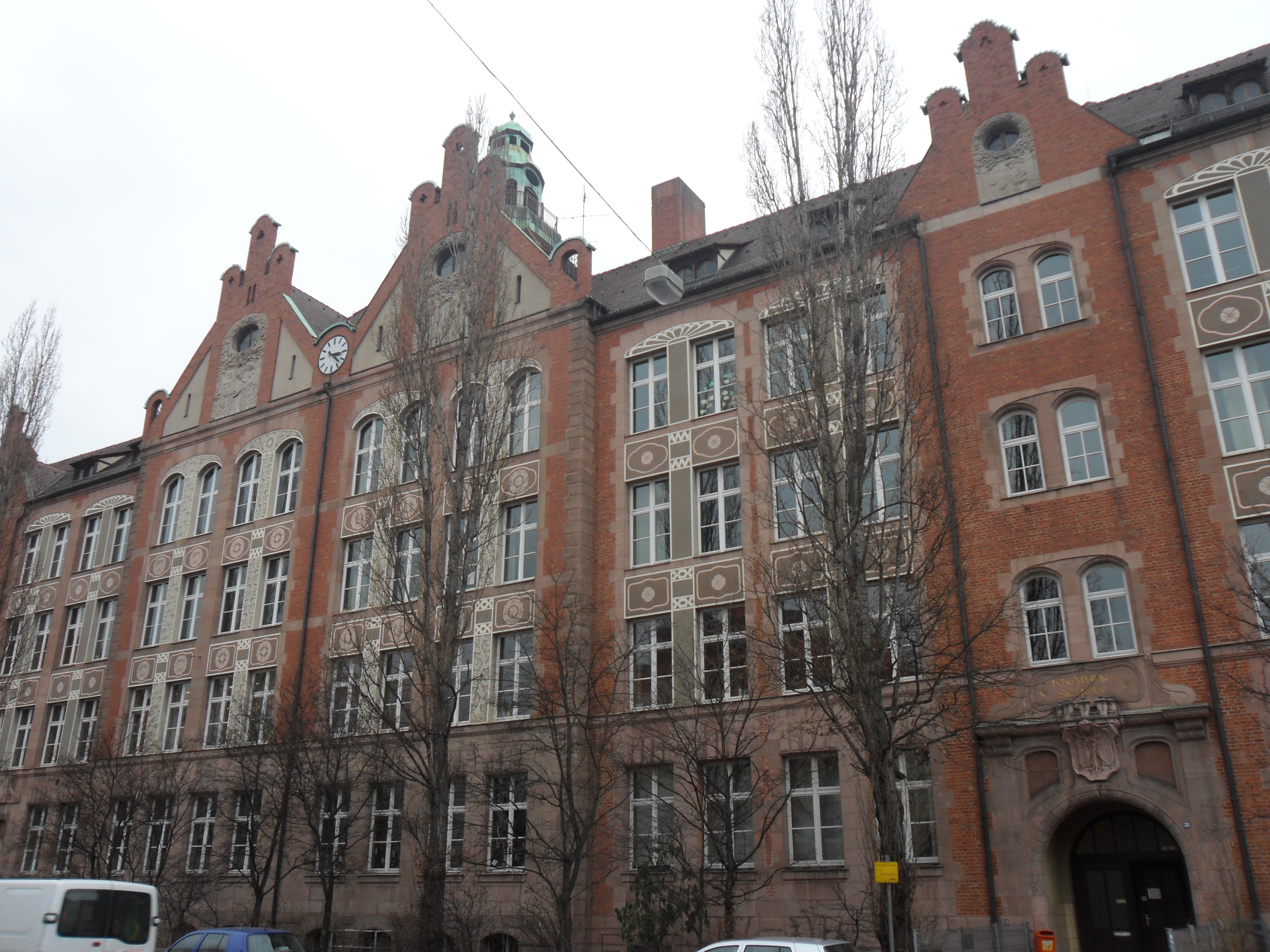 Dr.-Theo-Schöller-Grundschule und -Mittelschule Schnieglinger Str. 38 06